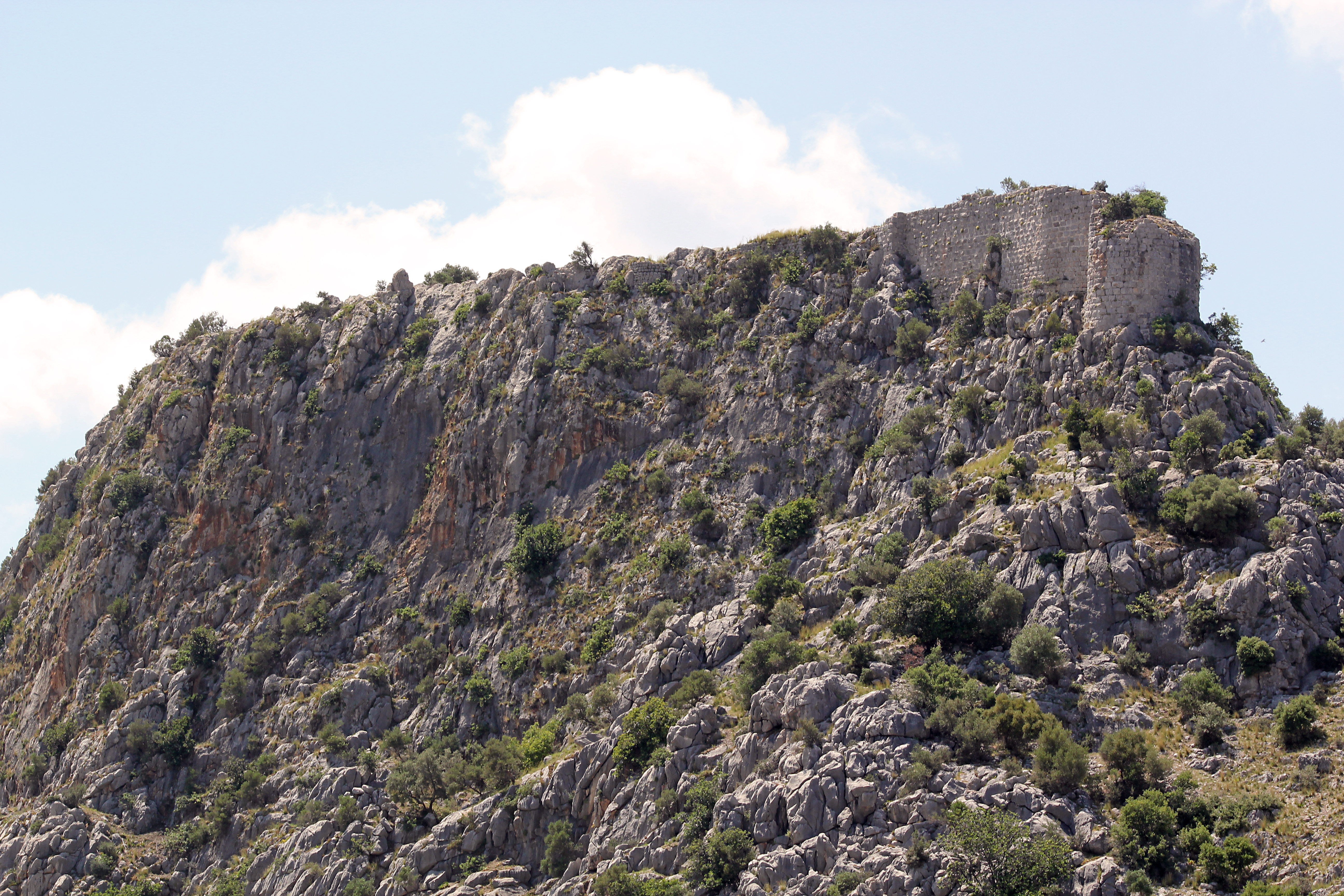 Gökvelioğlu Kalesi, mittelalterliche Burg in der Cukurova-Ebene, Südtürkei